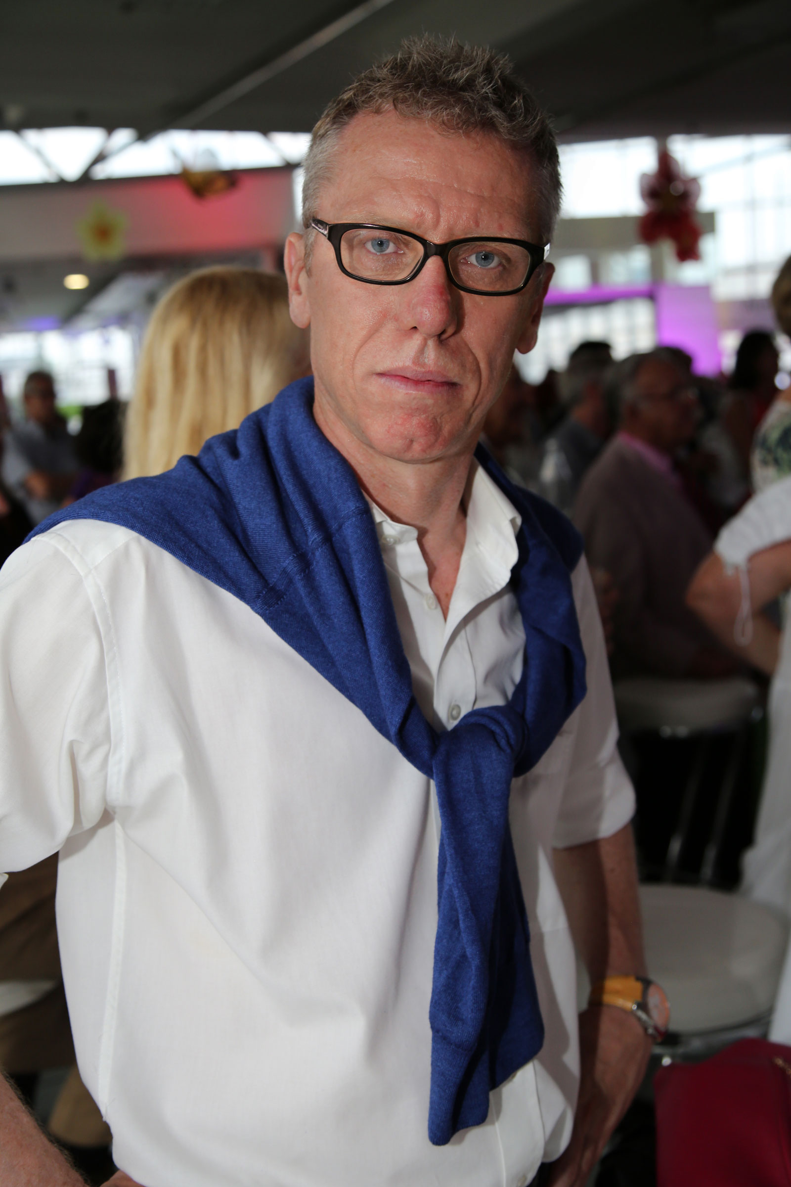 Stöger_Peter-7356-fmp